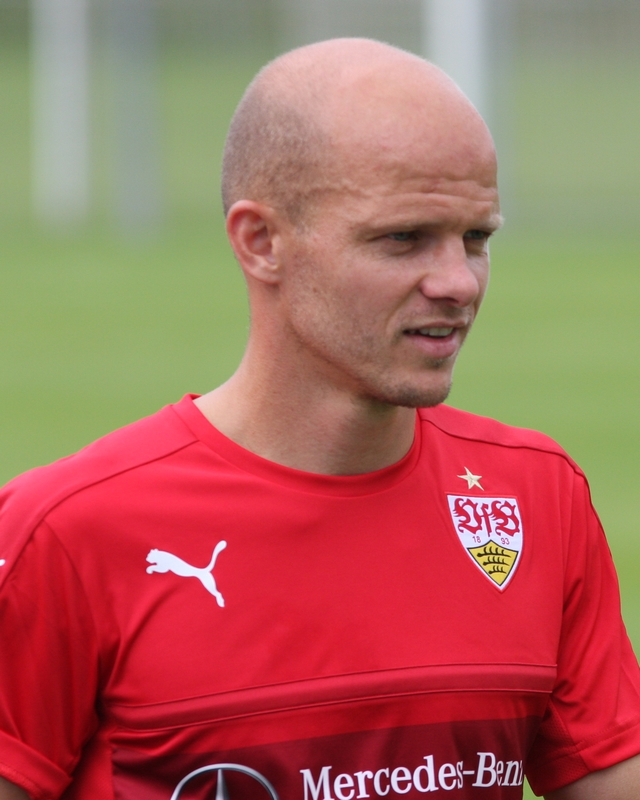 Tobias Werner bei seiner ersten VfB-Trainingseinheit. Aufgenommen von